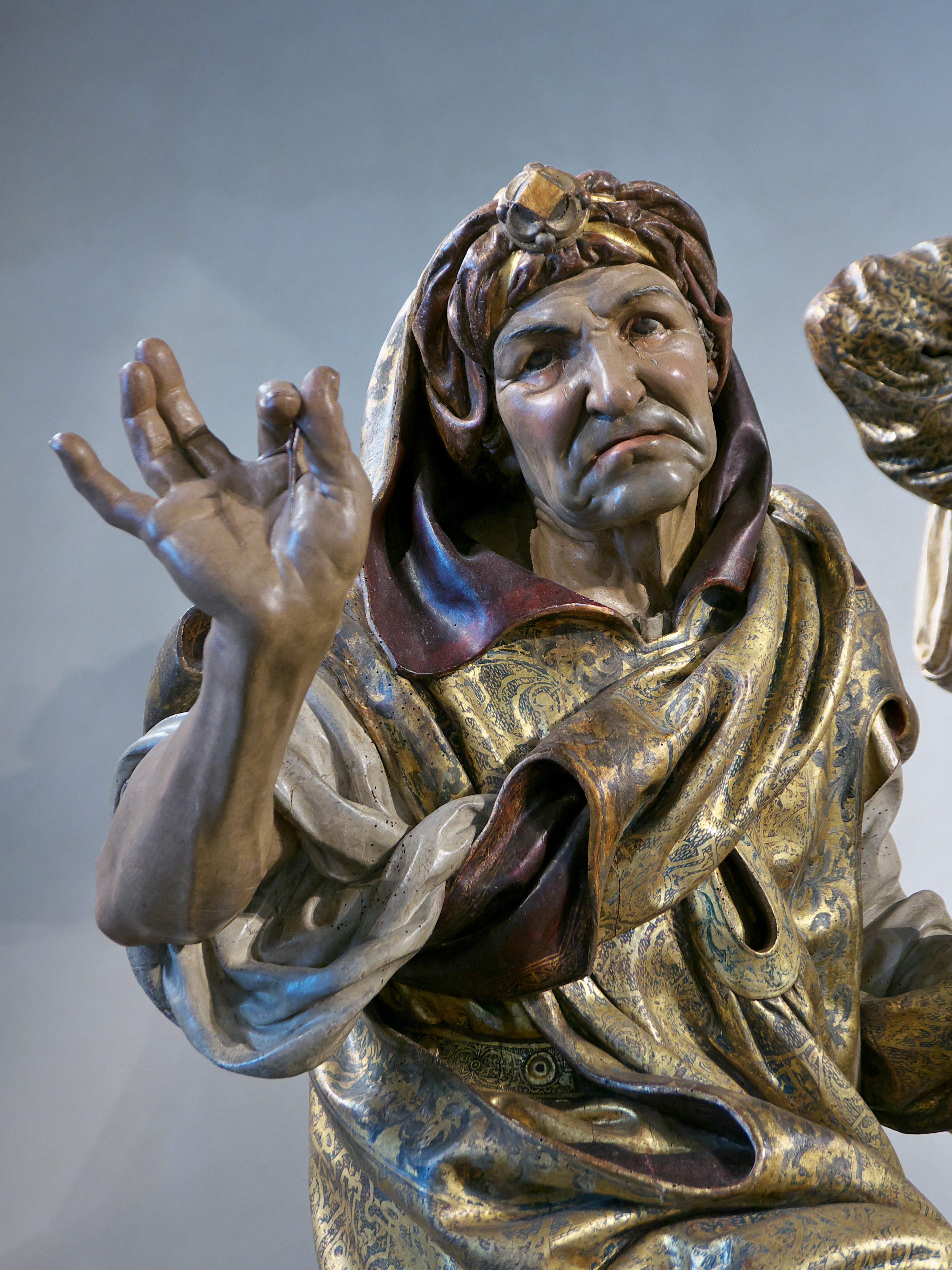 Entierro de Cristo, Museo Nacional de Escultura. Juan de Juni (1541-1541) talla, en madera policromada, a José de Arimatea, componente del grupo escultórico, con una espina de la corona en la mano.